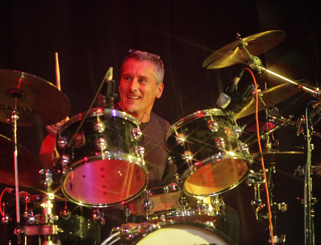 Resl Josef 2011